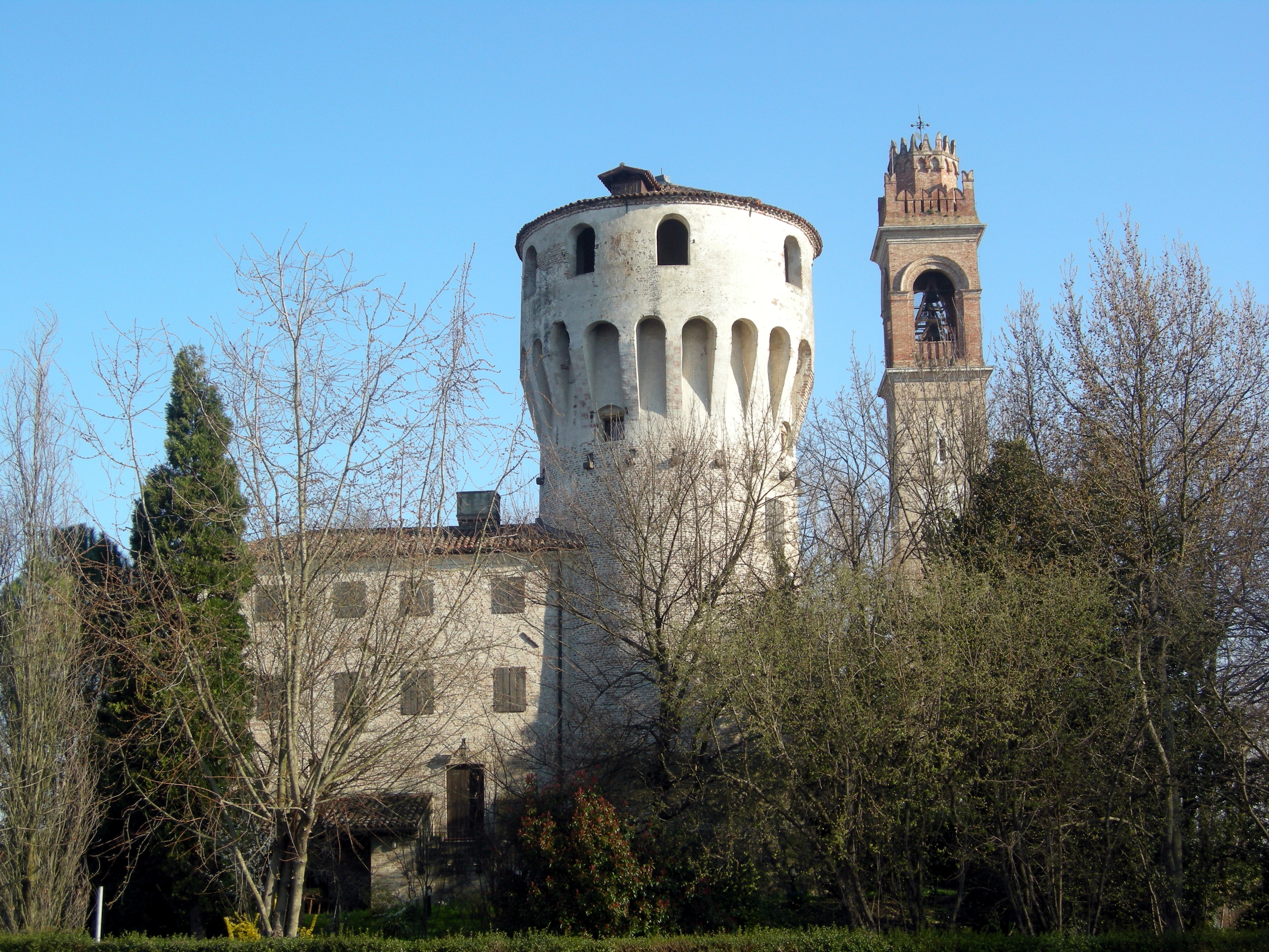 Casale sul Sile (provincia di Treviso): torre del castello medioevale, GFDL